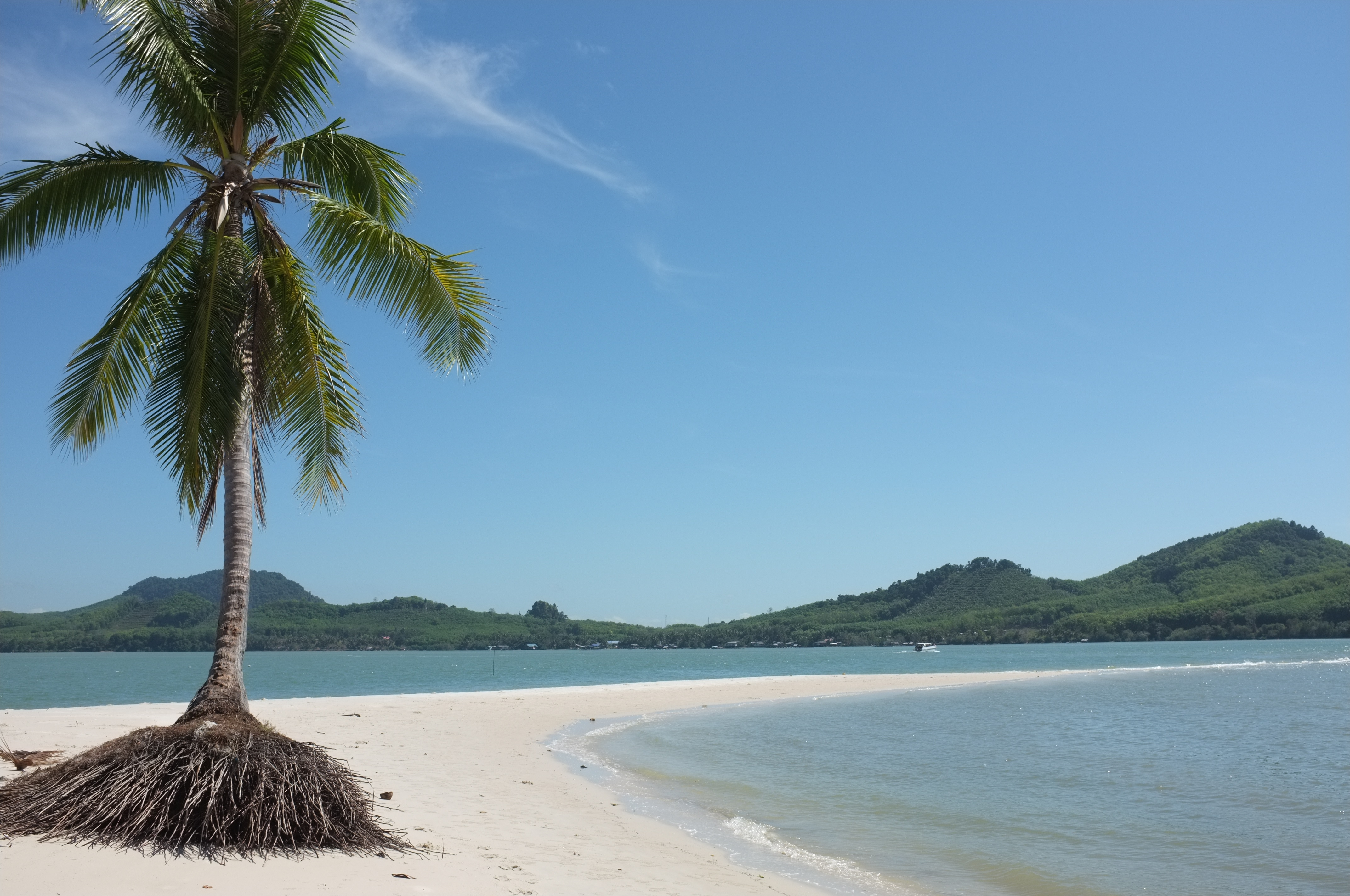 Der absolute Traumstrand auf Ko Yao Yai. Eine Sandzunge führt von der Insel ewig weit ins Meer. Die meiste Zeit über waren wir die einzigen am Strand